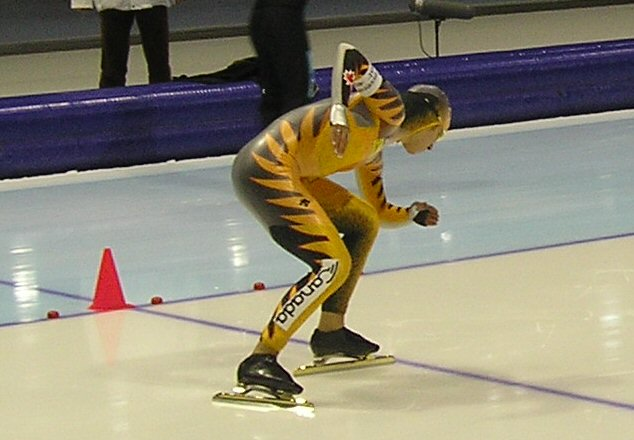 Shannon Rempel (CAN) at a World Cup in Thialf (Heerenveen, The Netherlands)